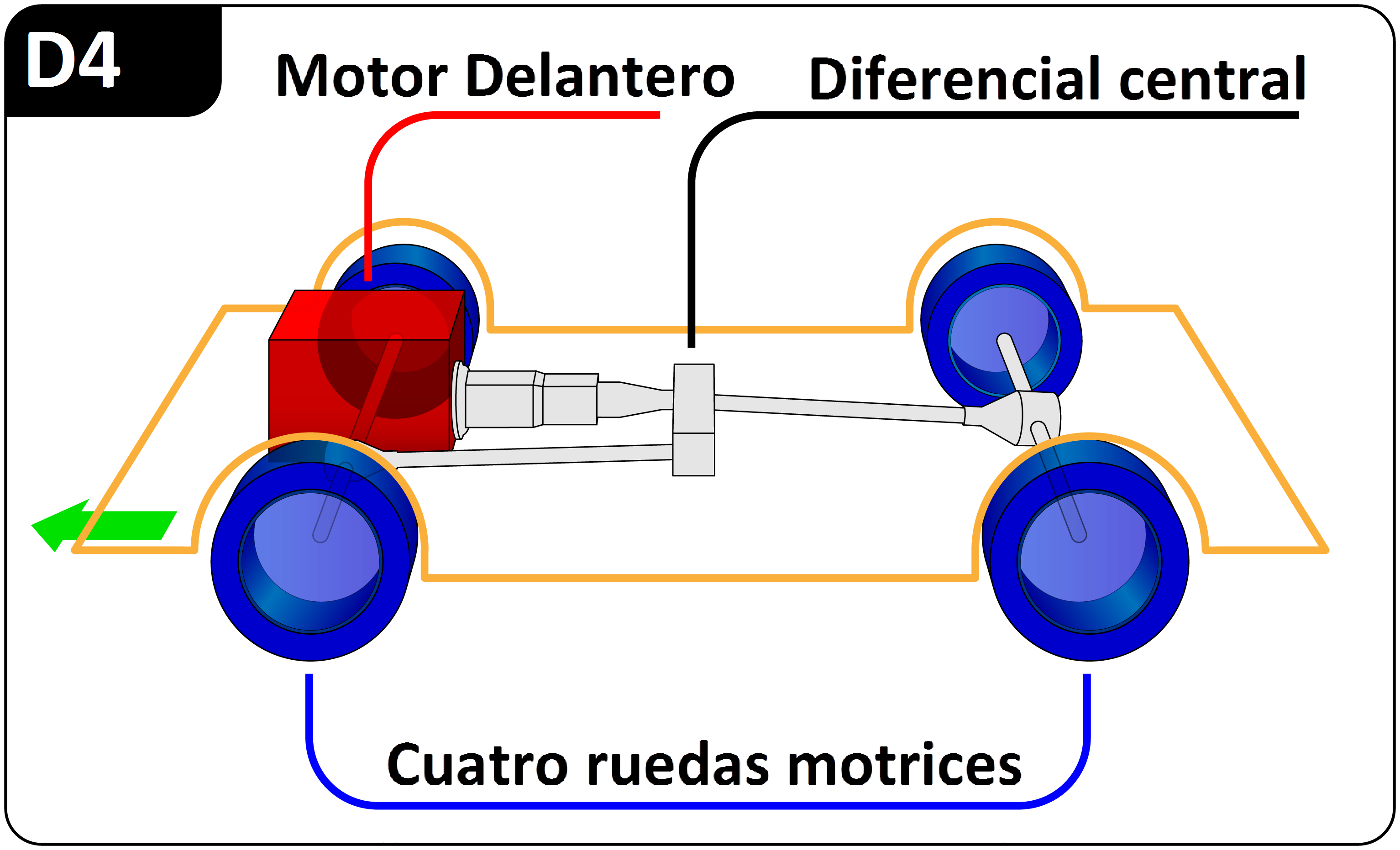 Diagrama de un vehículo con motor delantero y tracción en las cuatro ruedas (D4)